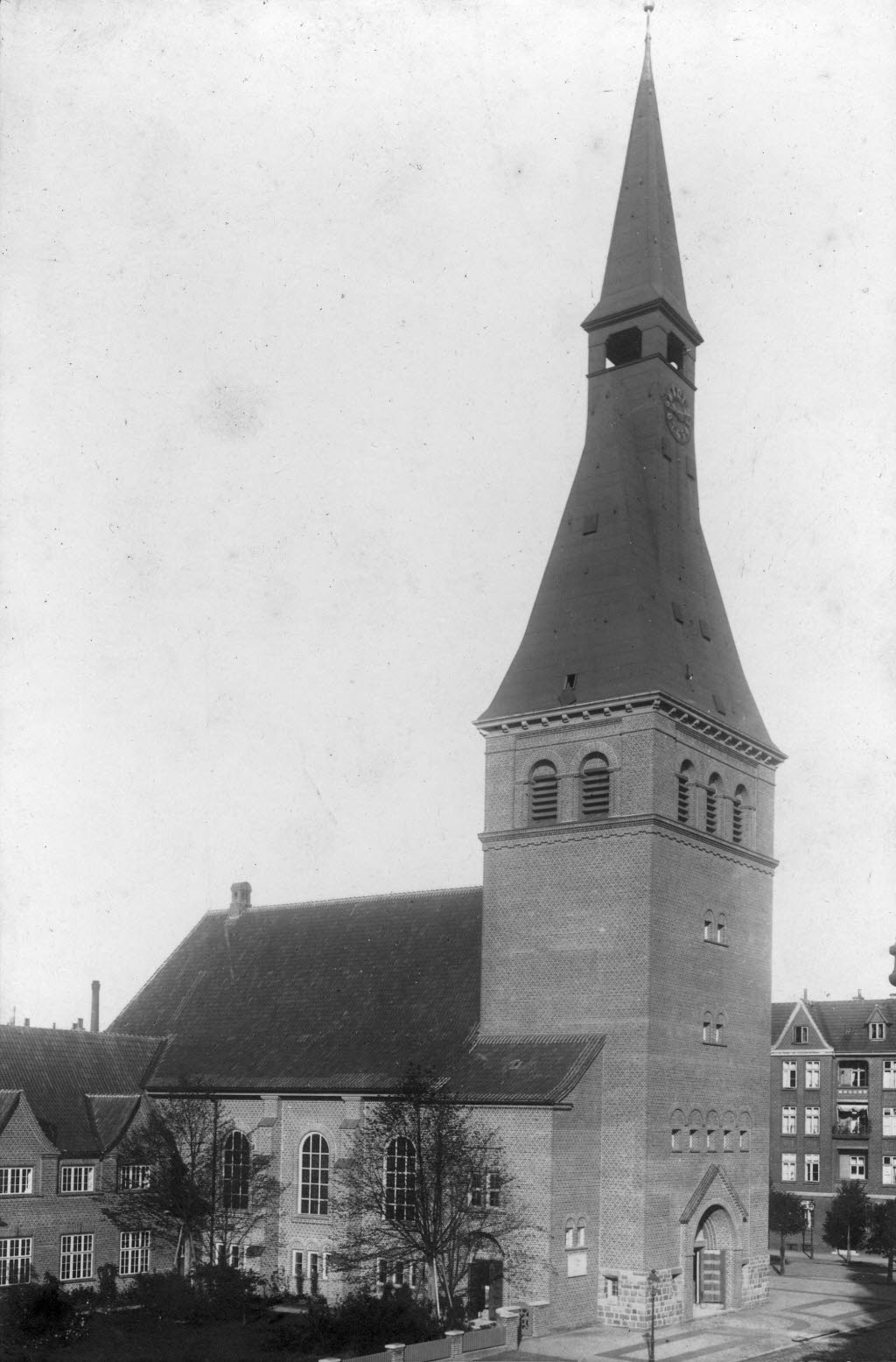 Vicelinkirche in der Harmsstraße